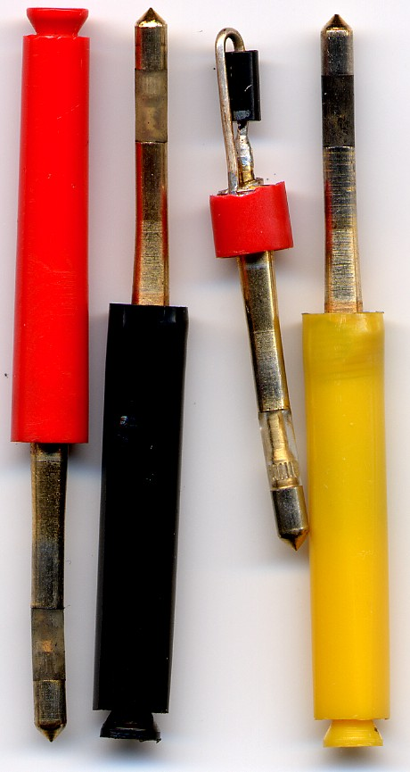 Diodenstecker